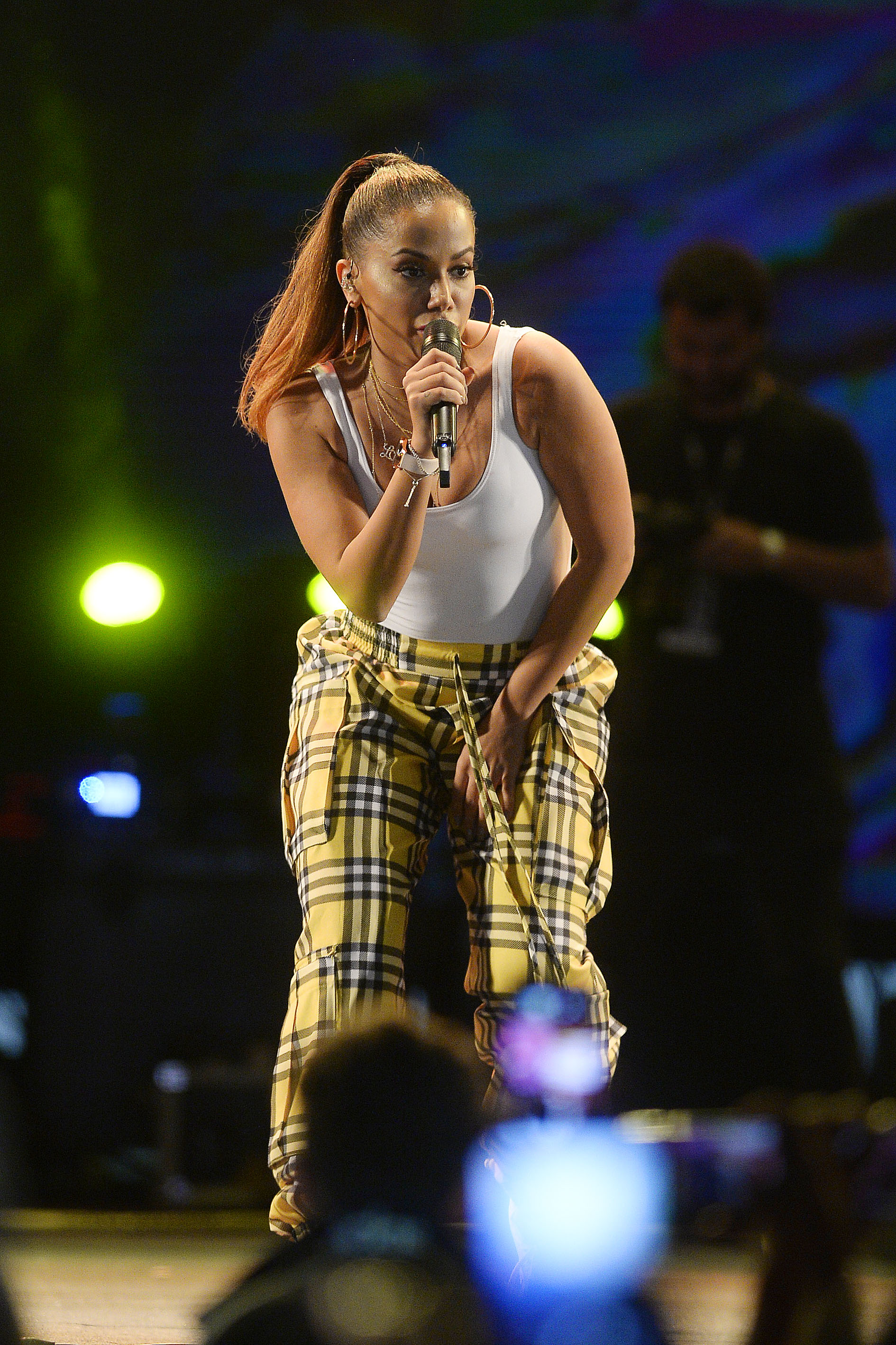 A capital comemora o seu 59º aniversário com shows de ritmos variados na Esplanada dos Ministérios na noite deste domingo (21/04). Fotos: Joel Rodrigues/ Agência Brasilia